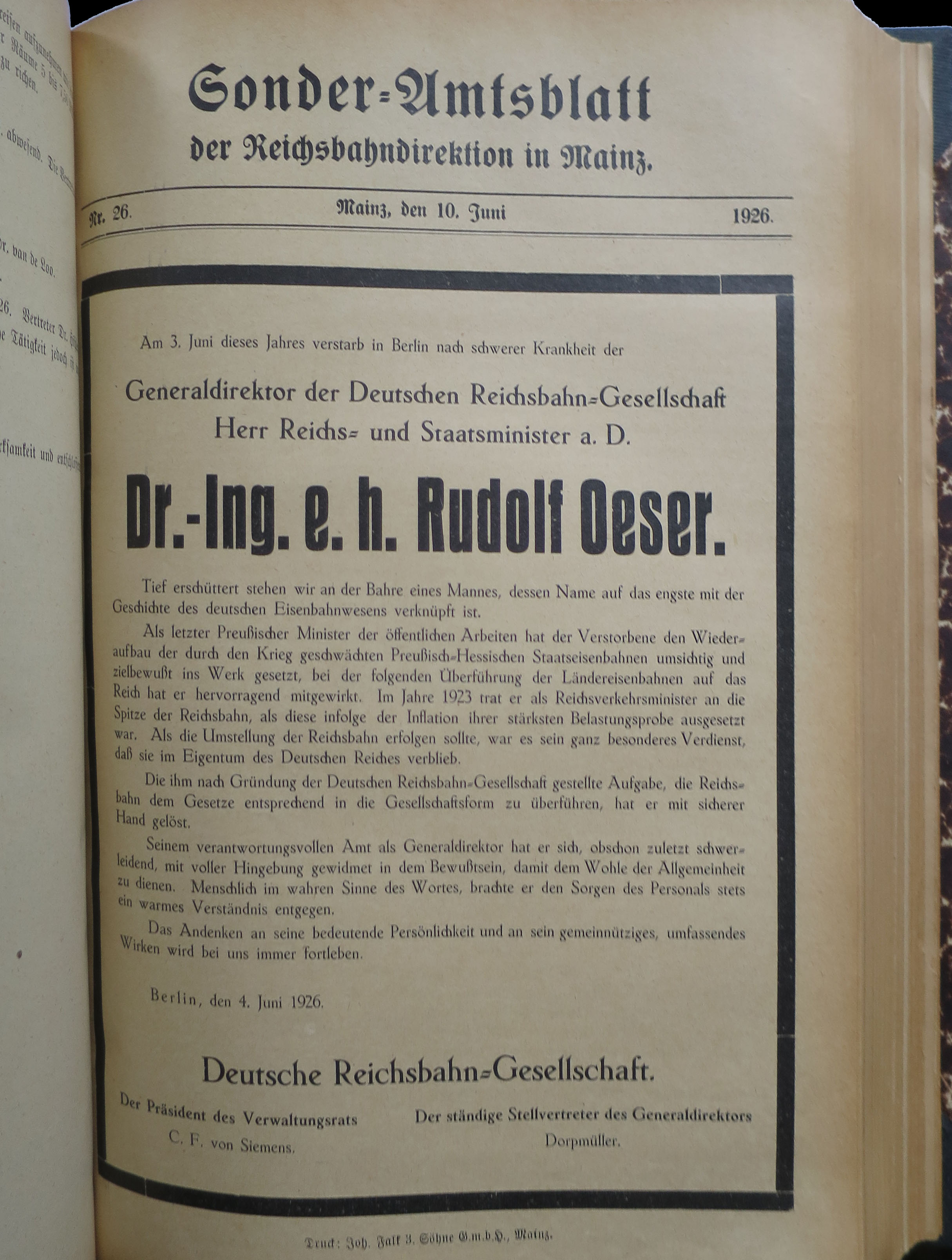 Traueranzeige für den verstorbenen Präsidenten der Deutschen Reichsbahn-Gesellschaft, Rudolf Oeser